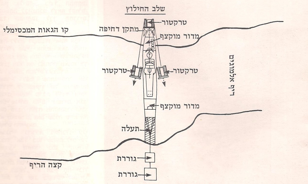 תרשים חילוץ אח"י געש (סער 3) מהחוף הסעודי.